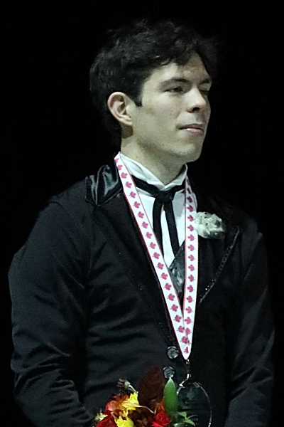 2018 Skate Canada International